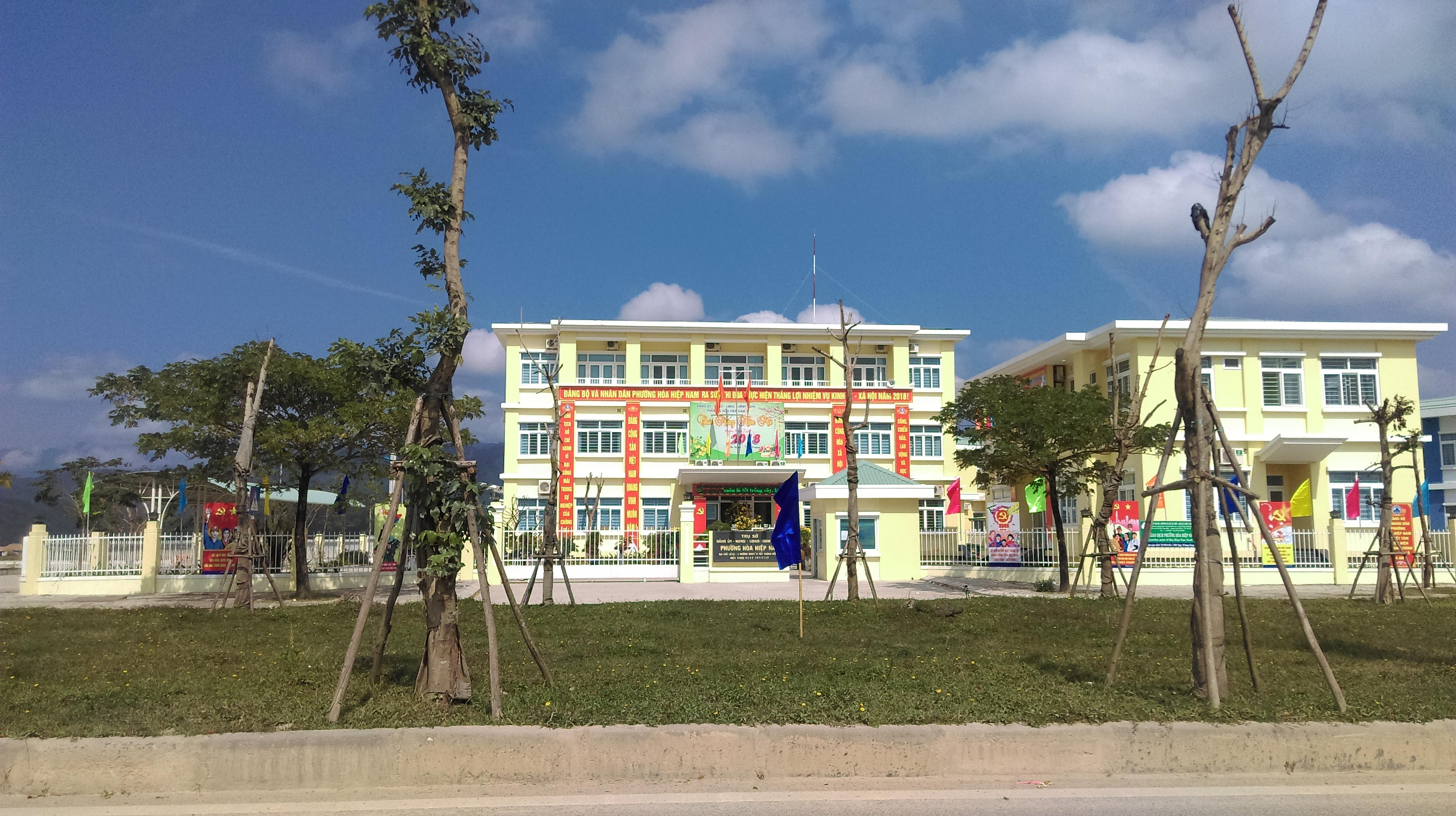 UBND phường Hòa Hiệp Nam, Liên Chiểu, Đà Nẵng